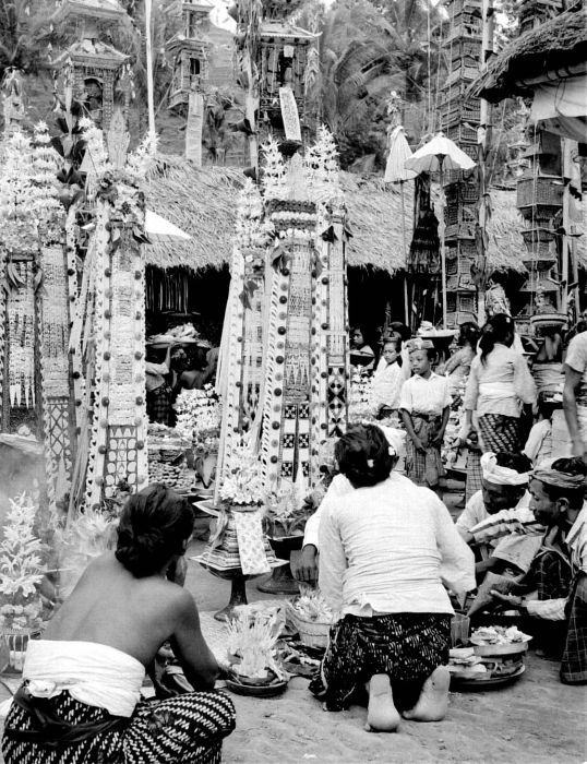 Negatief. Vrouwen bij het aanbieden van hoge, rijk bewerkte offers in Pura Kehen, Bali.